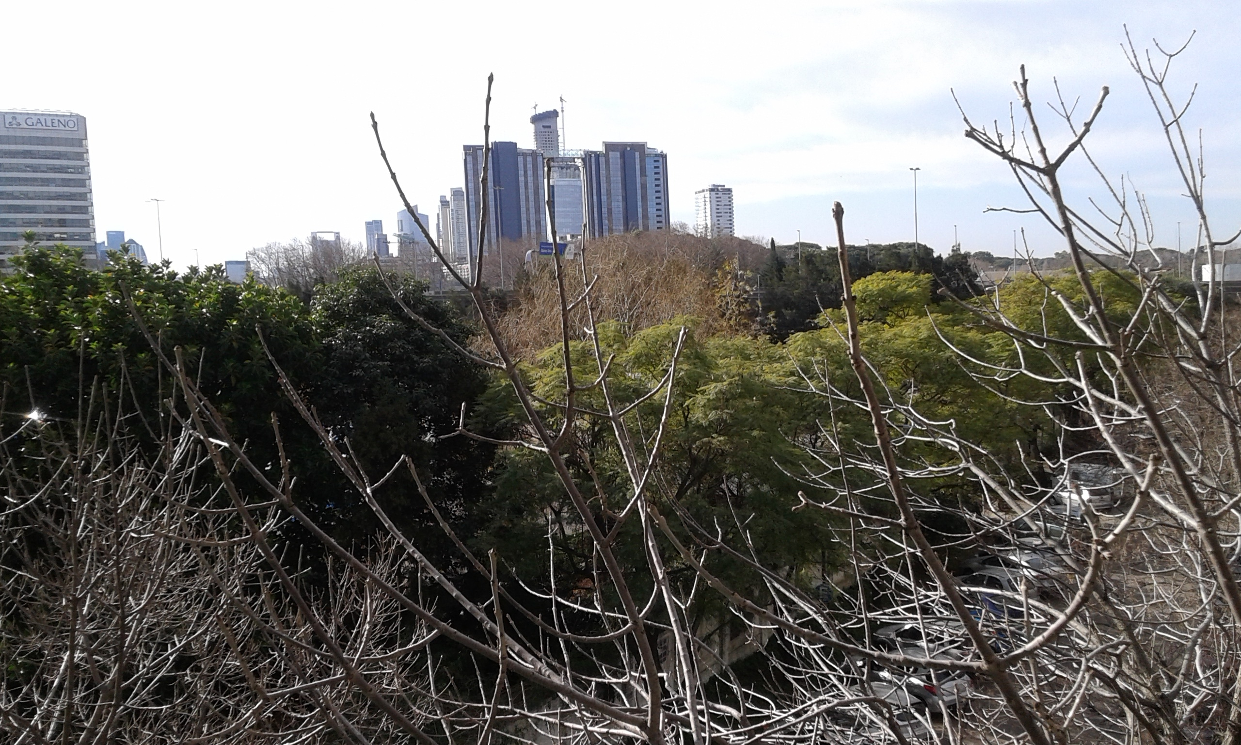 Este es mi barrio, donde la mano del hombre y la naturaleza contrastan constantemente.